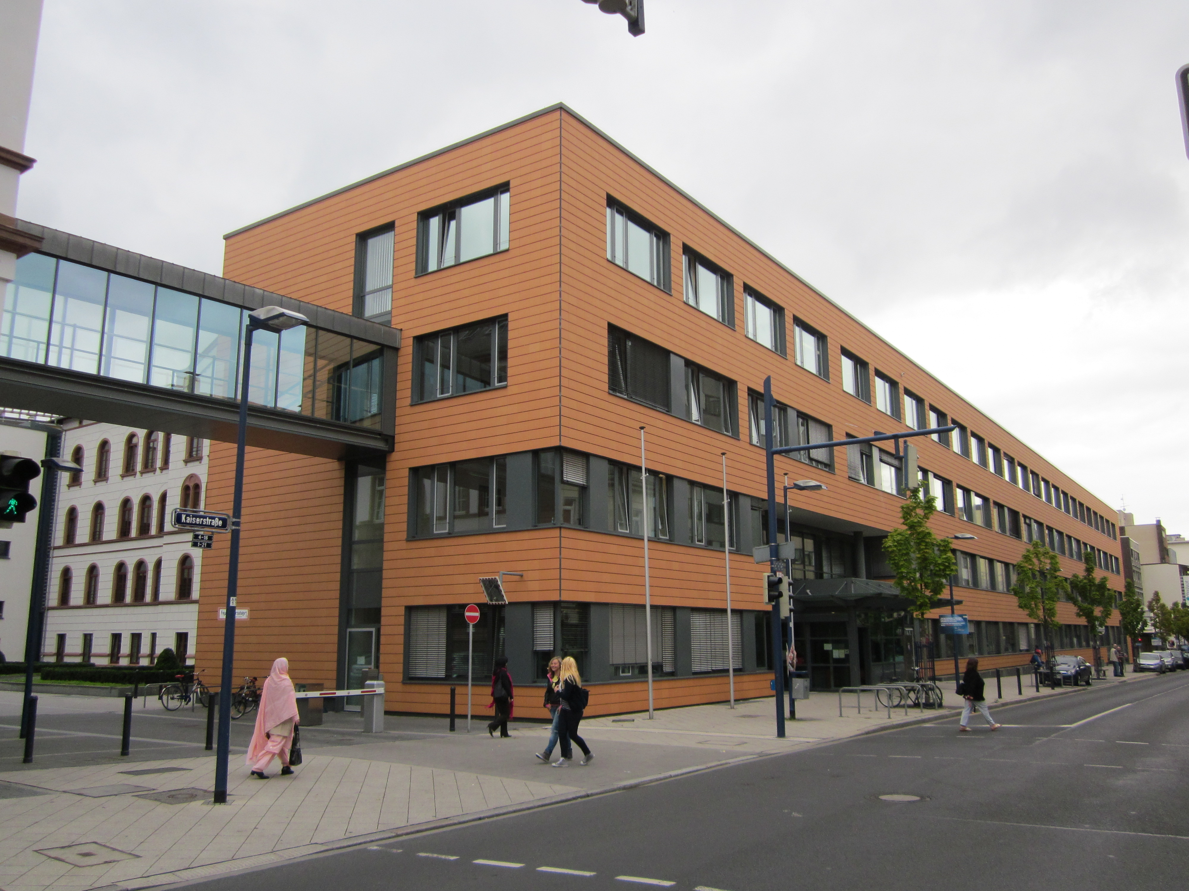 Das Justizzentrum Offenbach wurde 2005 fertiggestellt. Es beherbergt das Amtsgericht Offenbach am Main, das Arbeitsgericht Offenbach am Main und die Außenstelle Offenbach der Staatsanwaltschaft Darmstadt.